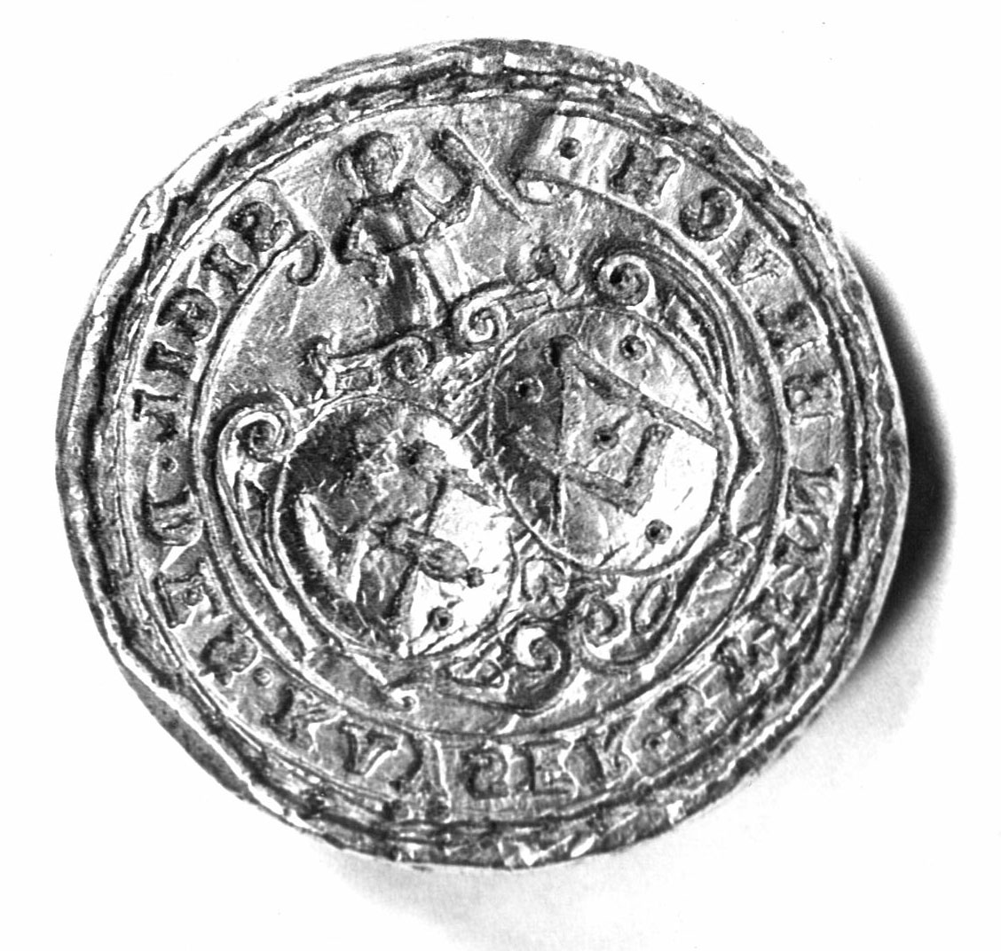 Siegel_17._Jh. Siegel des Steinmetz- und Maurerhandwerkes von Kaisersteinbruch im 17. Jh., ab 1617. Im Museum Mosonmagyaróvár, Ungarn.